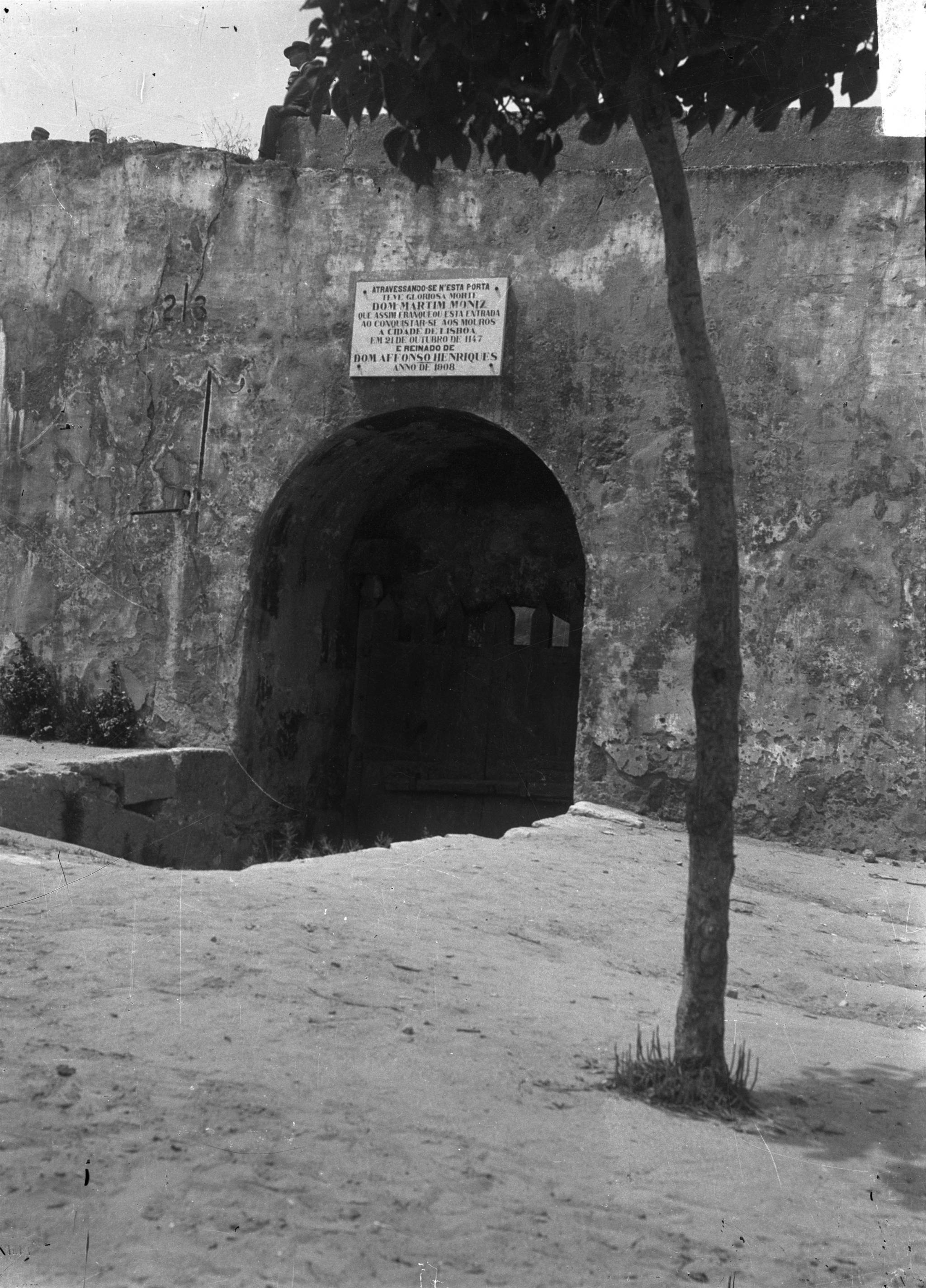 Título: Castelo de São Jorge. Lado interior da porta de Martim Moniz Dimensão: 9 x 12 cm Suporte: Negativo de gelatina e prata em vidro Unidades de descrição relacionadas: Cód. Referência: PT/AMLSB/POR/053080 Título: Castelo de São Jorge, lado interior da porta de Martim Moniz Notas: Inscrição no original: 6134; C12 Assunto: Castelo de São Jorge / Porta de Martim Moniz / Lápide Código de referência: PT/AMLSB/BAR/000086